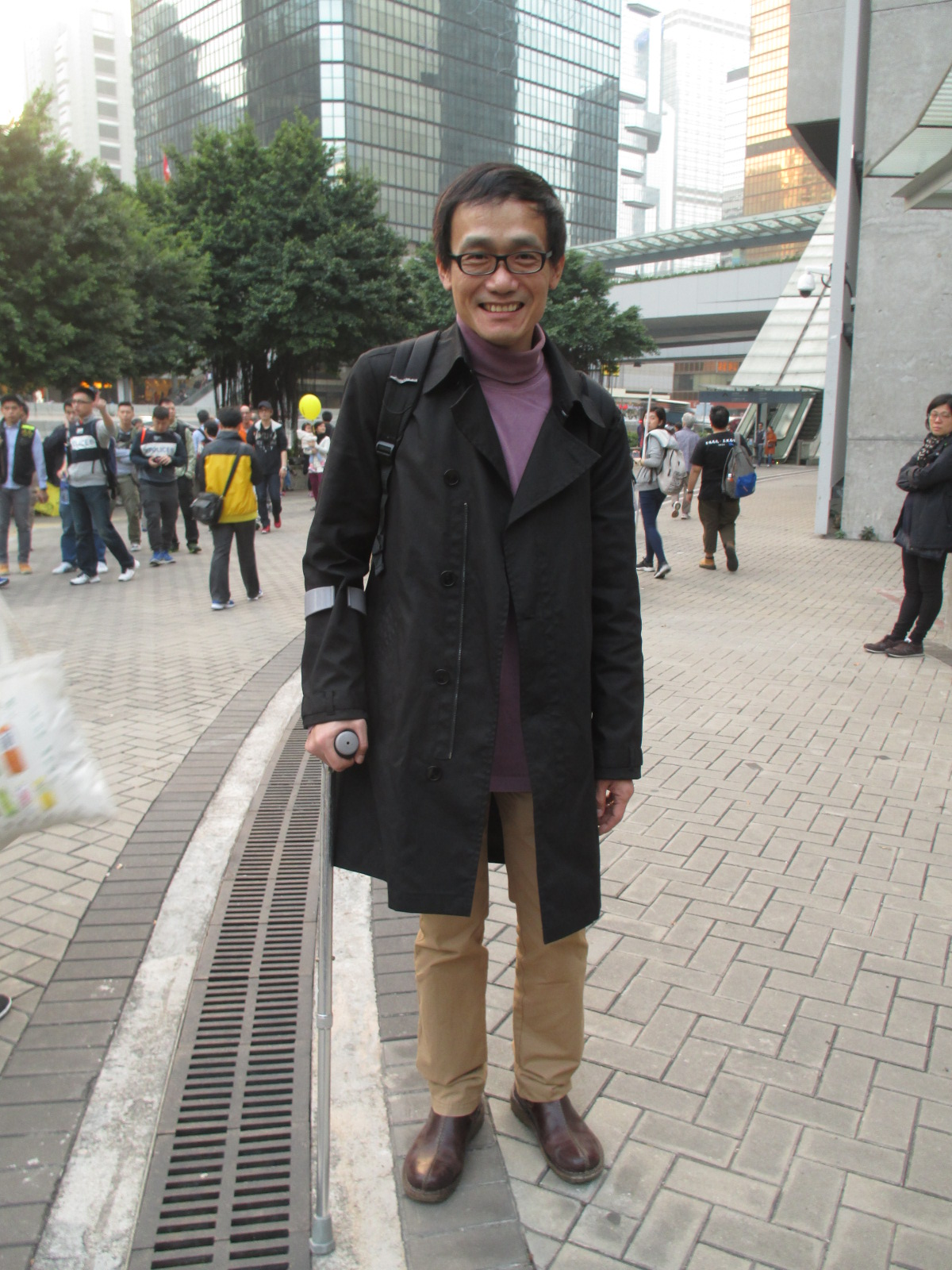 徐子見，2016年元旦遊行，金鐘政府總部外。